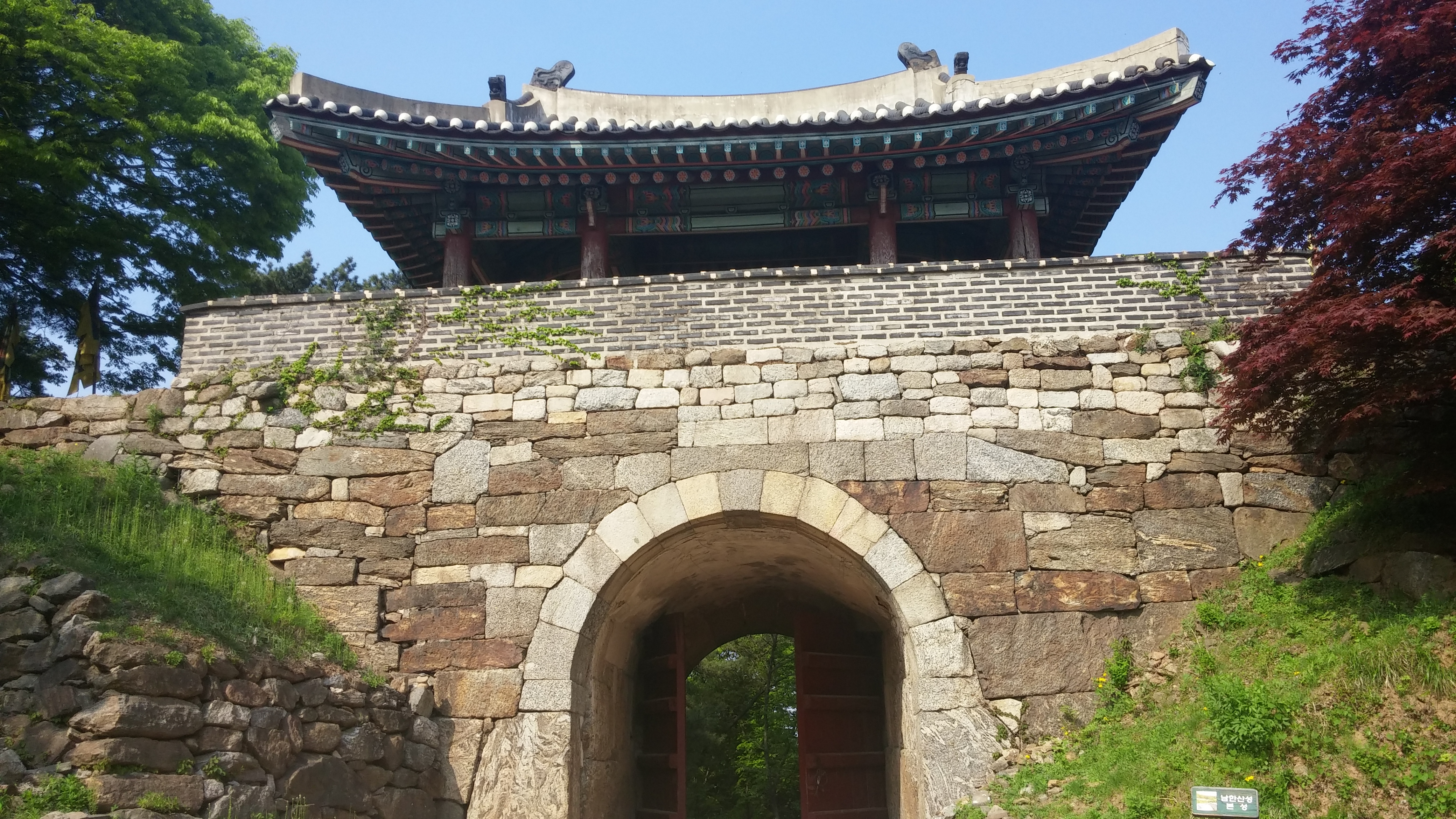 남한산성 북문 (2)